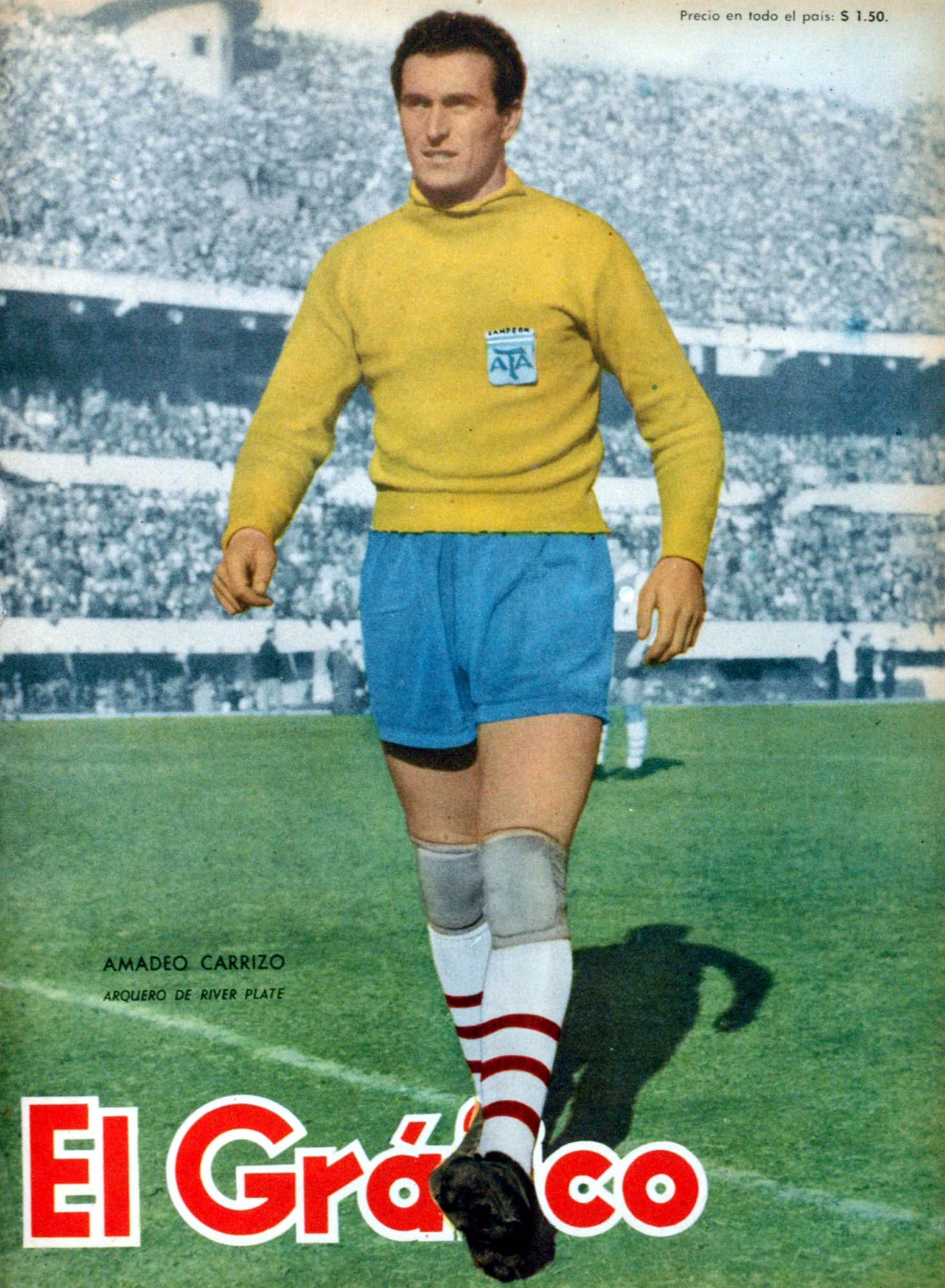 El Grafico del 26 de Noviembre de 1954. Edicion 1842